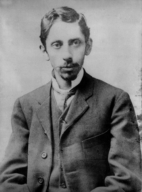 Baldomero Lillo Figueroa (1867 - 1923)